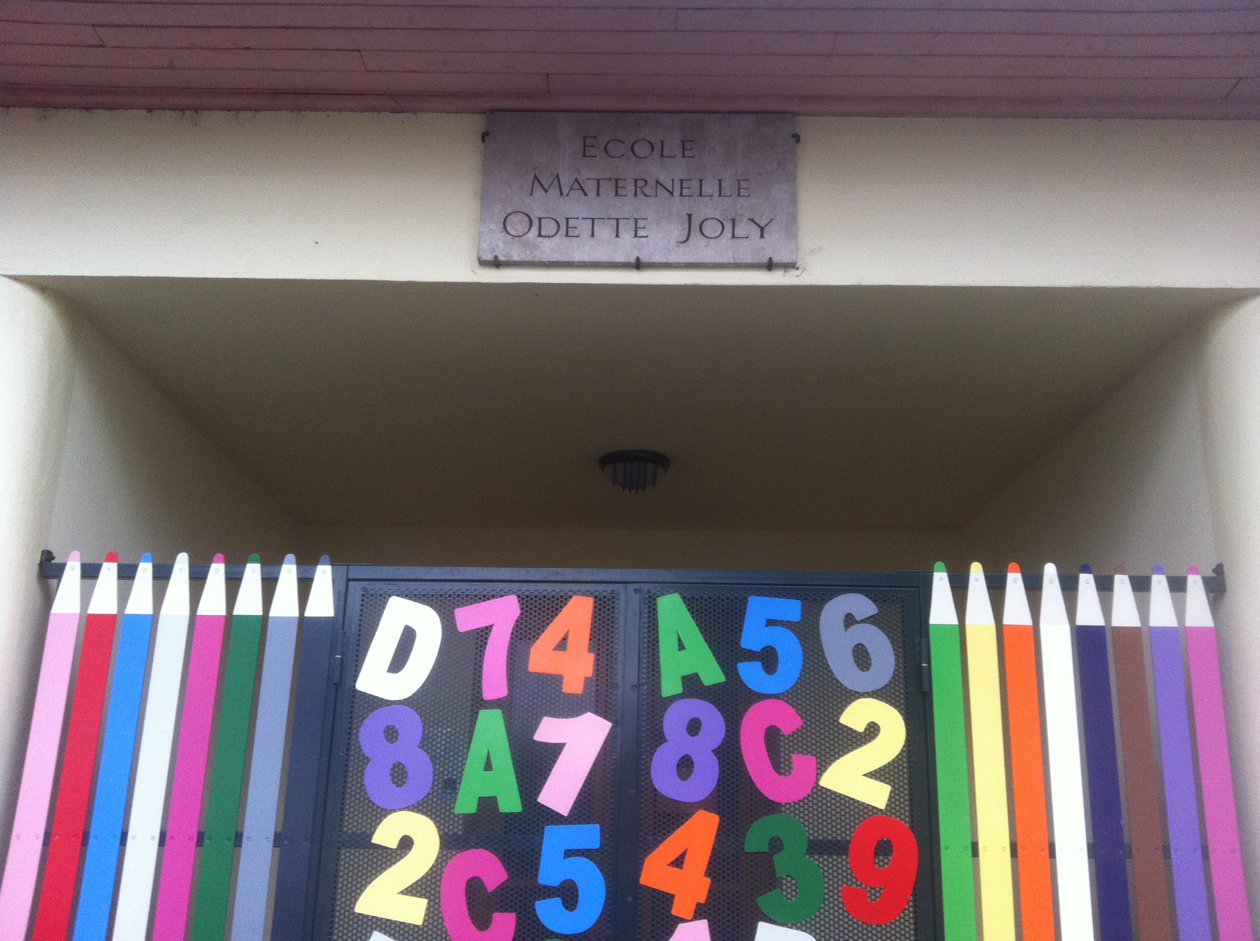 L'école Odette Joly, à Miribel, dans l'Ain, France.